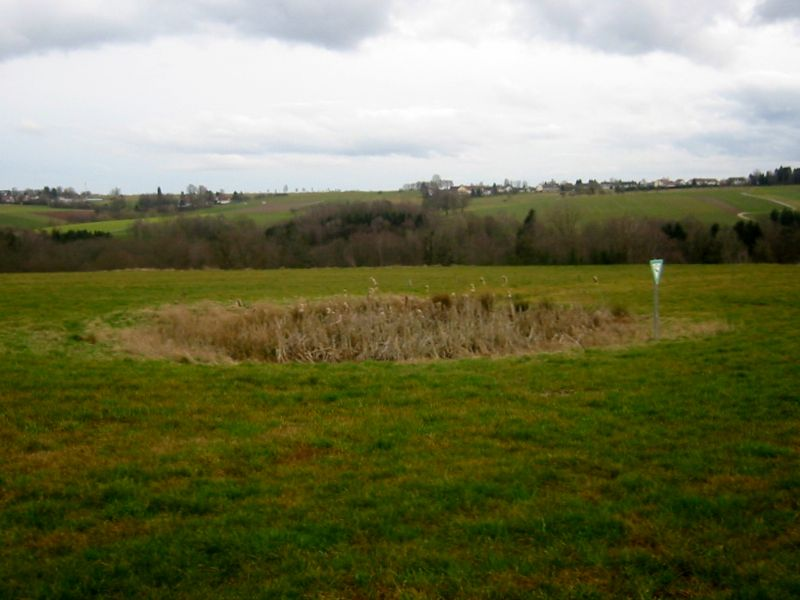 Beispiel einer Mardelle, bei Vinningen (Rheinl.-Pf.)